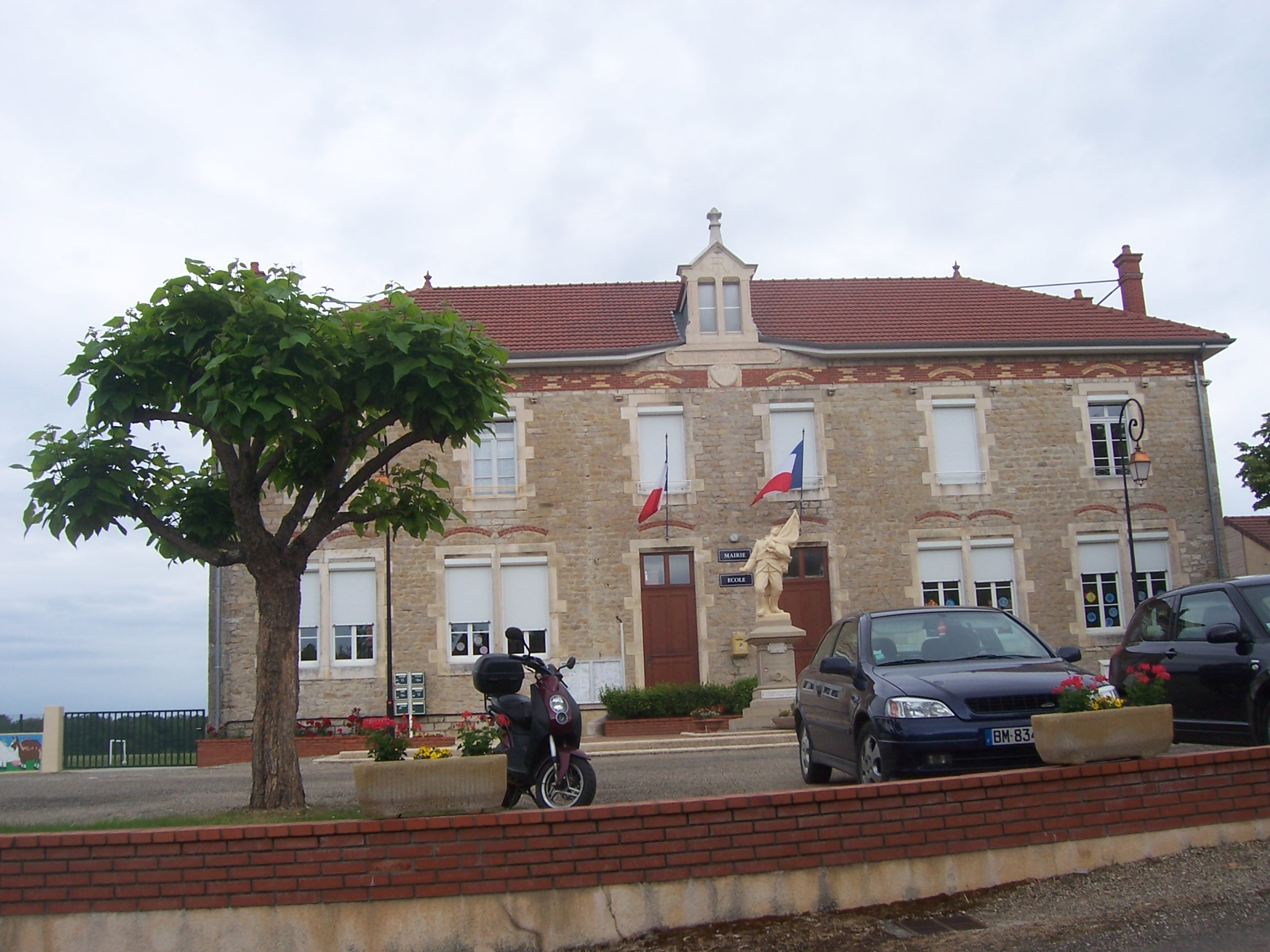 Mairie de La Chapelle-Naude